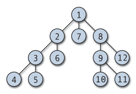 Tiefensuche: Beispielbaum mit Reihenfolge, in der die Baumknoten besucht werden